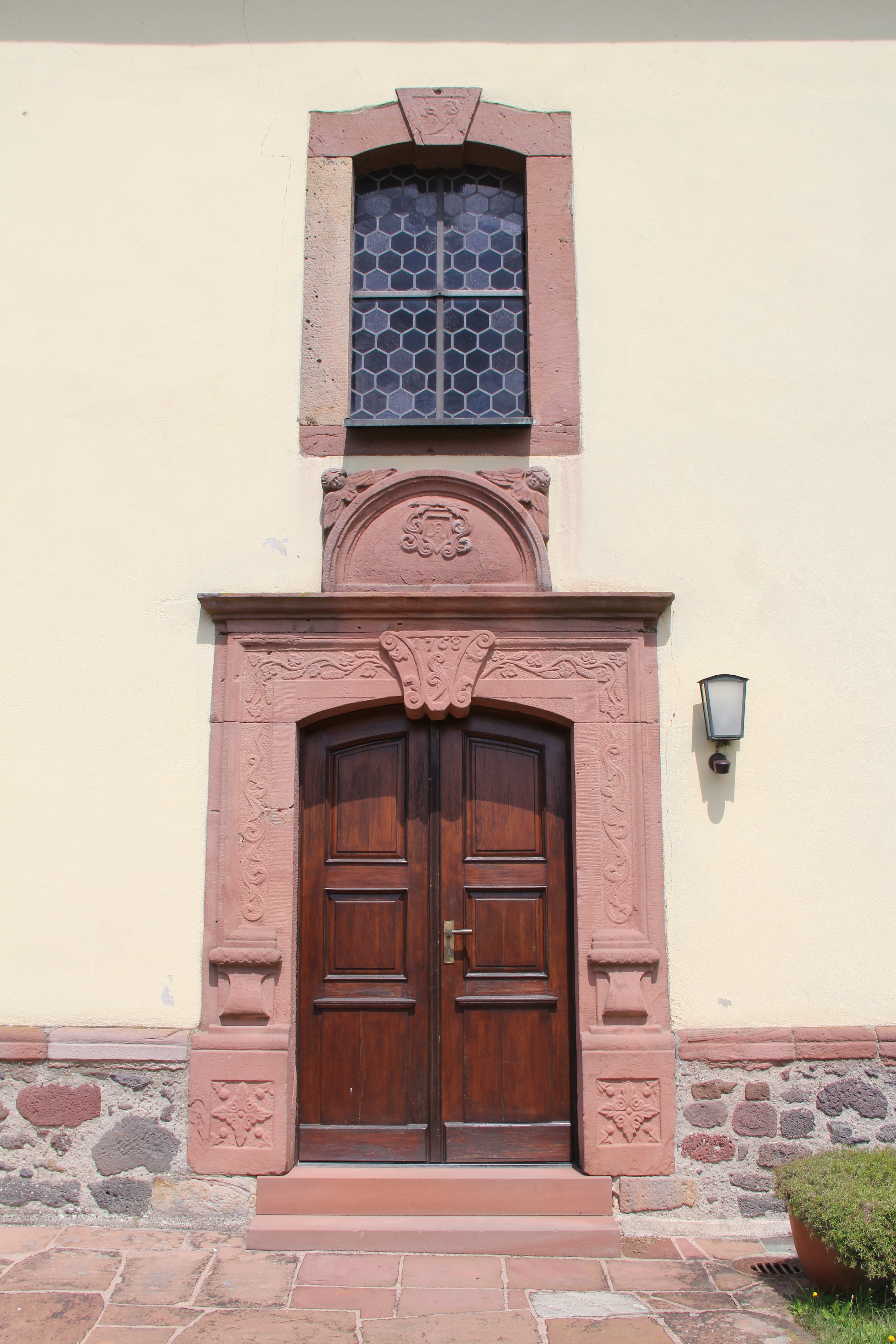 Evangelische Kirche Rüddingshausen (Rabenau)